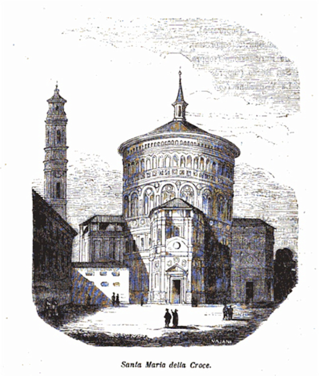 Illustrazione del santuario di Santa Maria della Croce